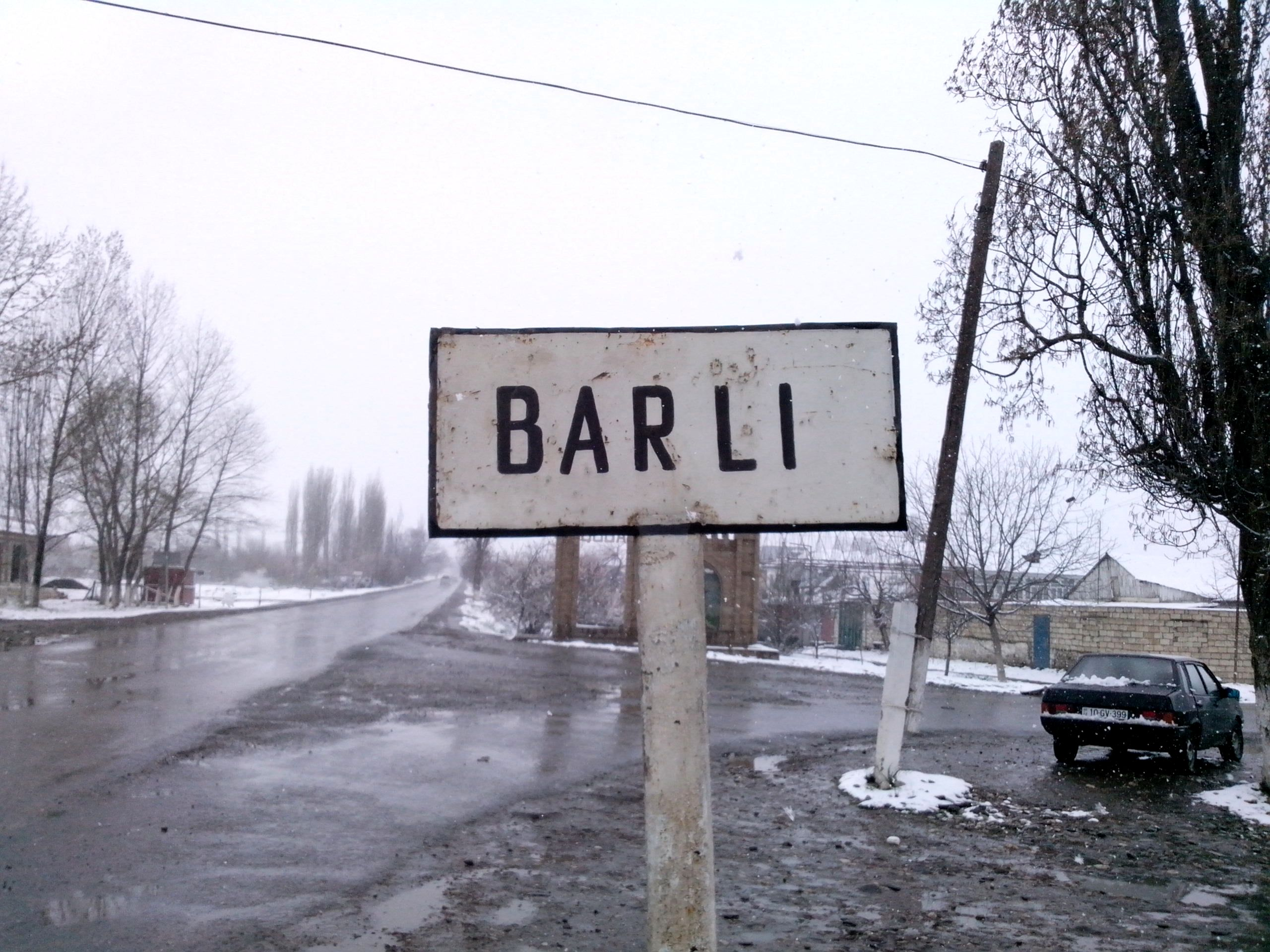 Quba rayonu Barlı qəsəbəsi